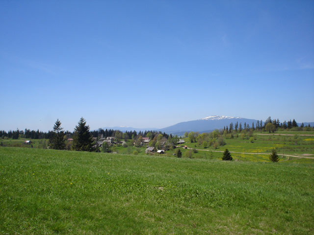 Widok ze stoków Pająków Wierchu na Babią Górę i Danielki. Autor: Andrzej Bielak